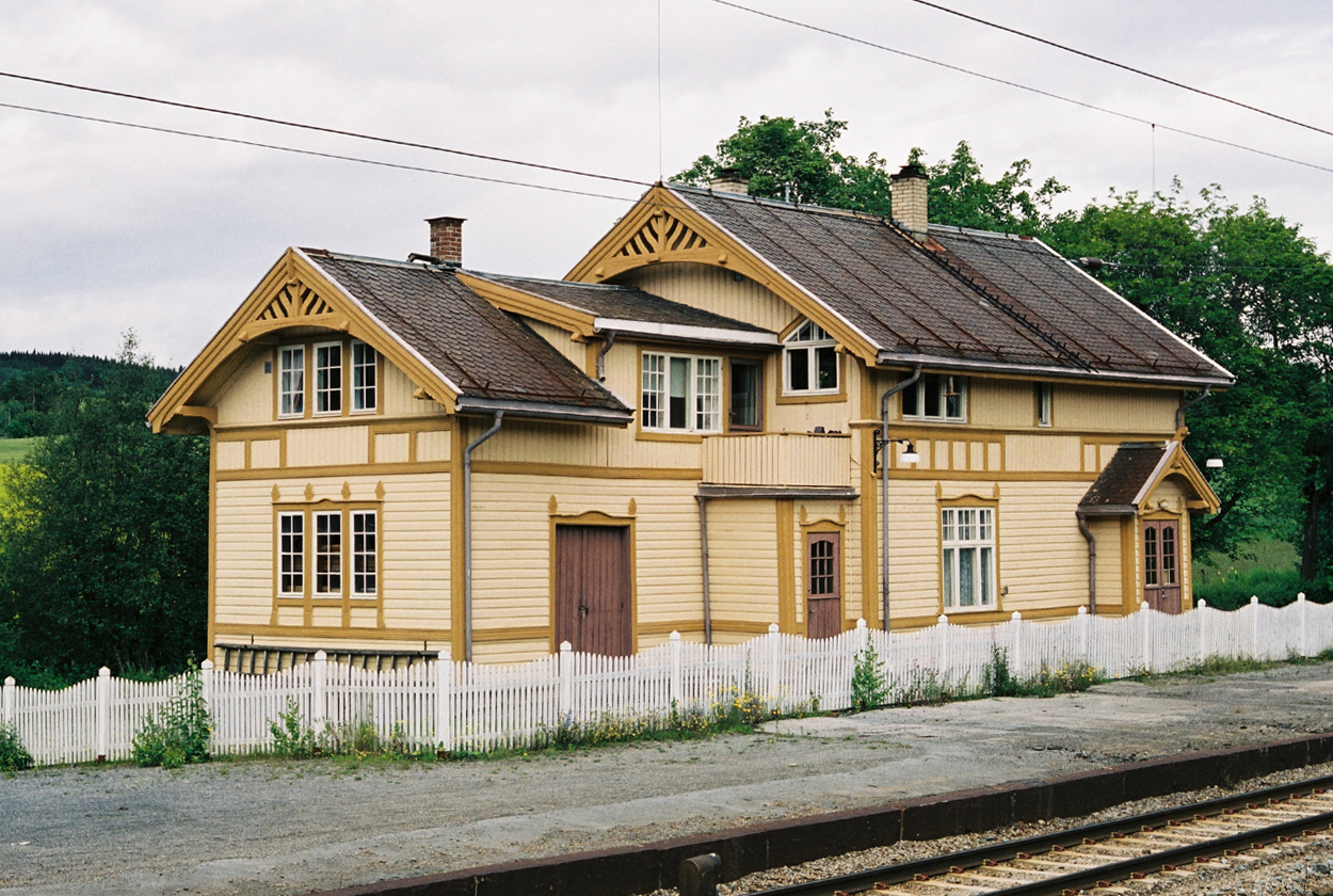 Grindvoll stasjon, Roa-Hønefosslinjen.